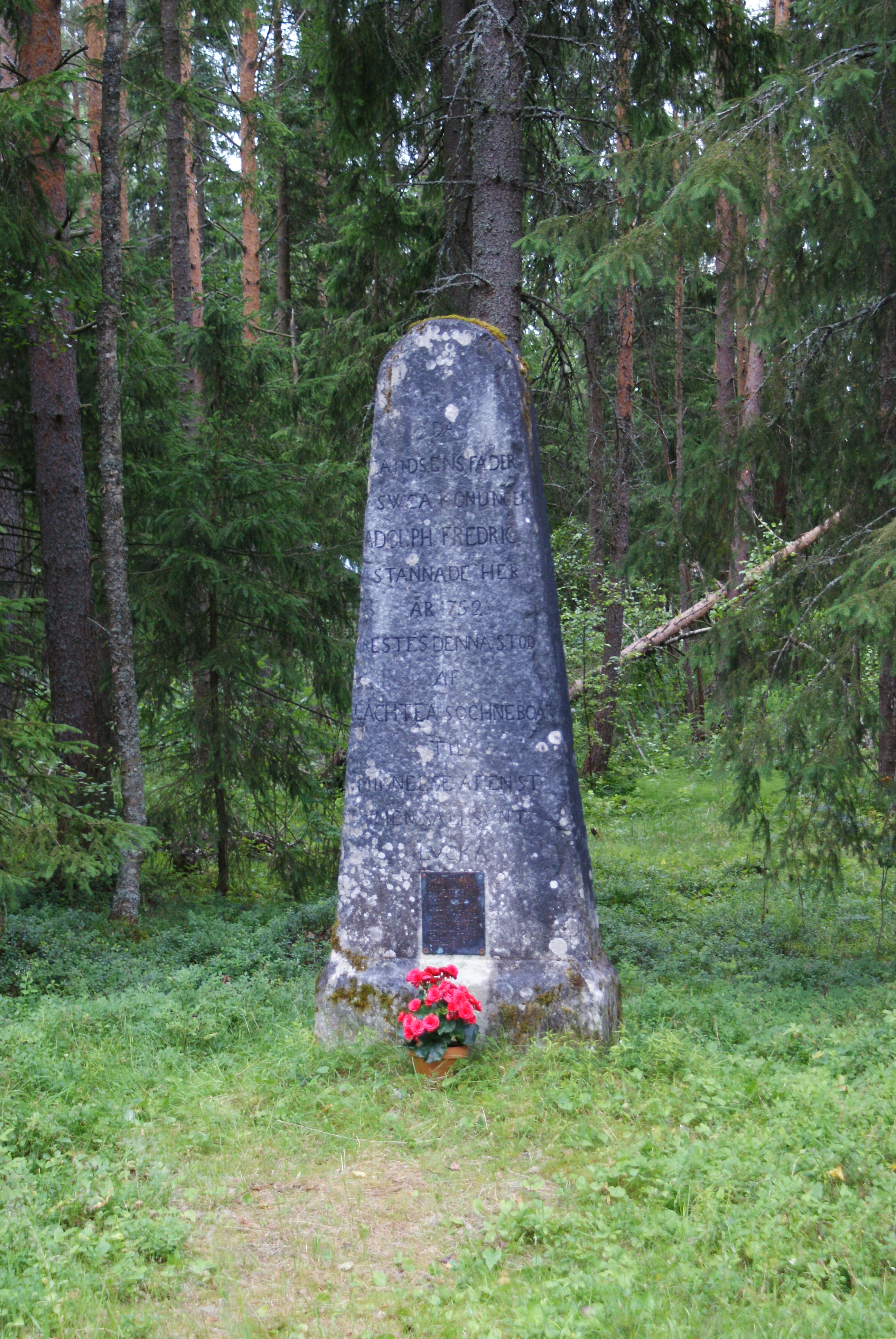 Minnessten där Adolf Fredrik stannade och åt. Inskriften lyder: "DÅ LANDSENS FADER SWEA KONUNGEN ADOLPH FREDRIC STANNADE HER ÅR 1752 RESTES DENNA STOD AF LÅCHTEA SOCHNEBOAR TILL MINNELSE AF EN STOR MEN SÄLLSYNT LYCKA"